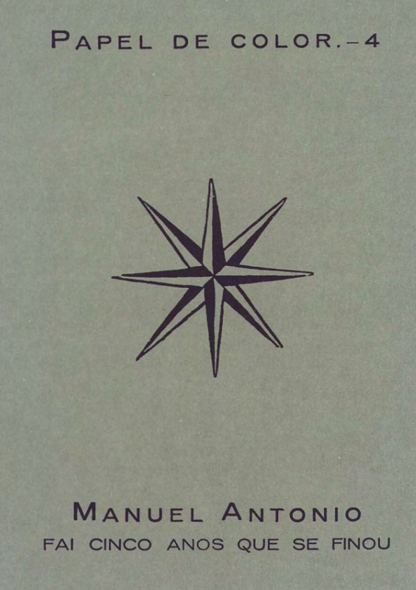 Imaxe da revista Papel de Color. Poema número catro.